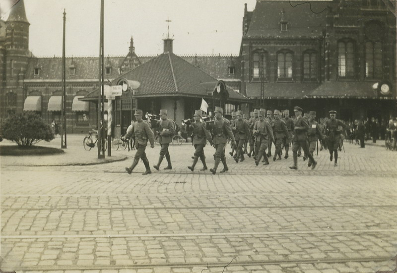 Een detachement infanteristen vertrekt vanaf het Stationsplein naar zijn legering op de maandag voor een ZVierdaagse in de jaren twintig